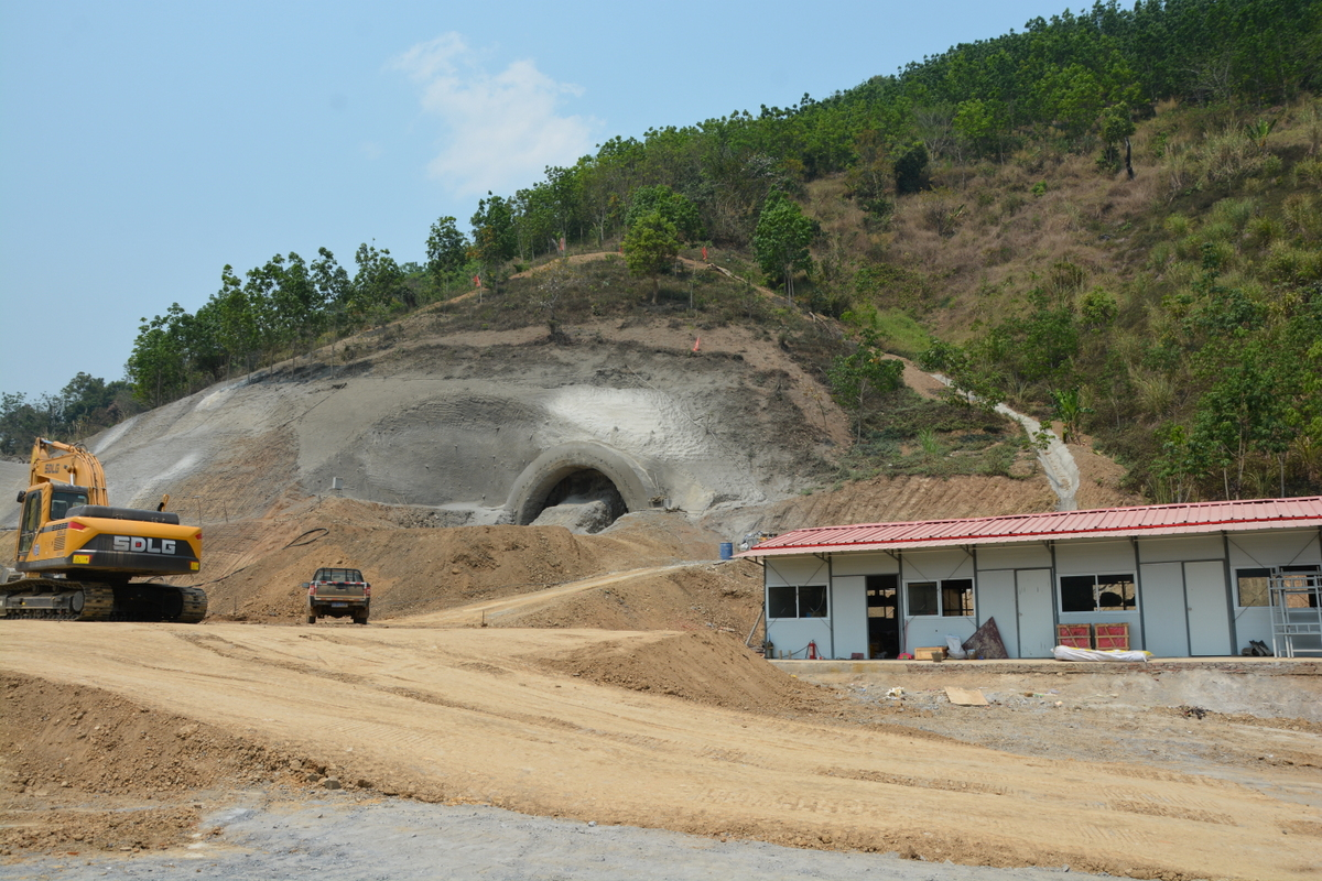 ボーテントンネル建設現場、2017年3月撮影